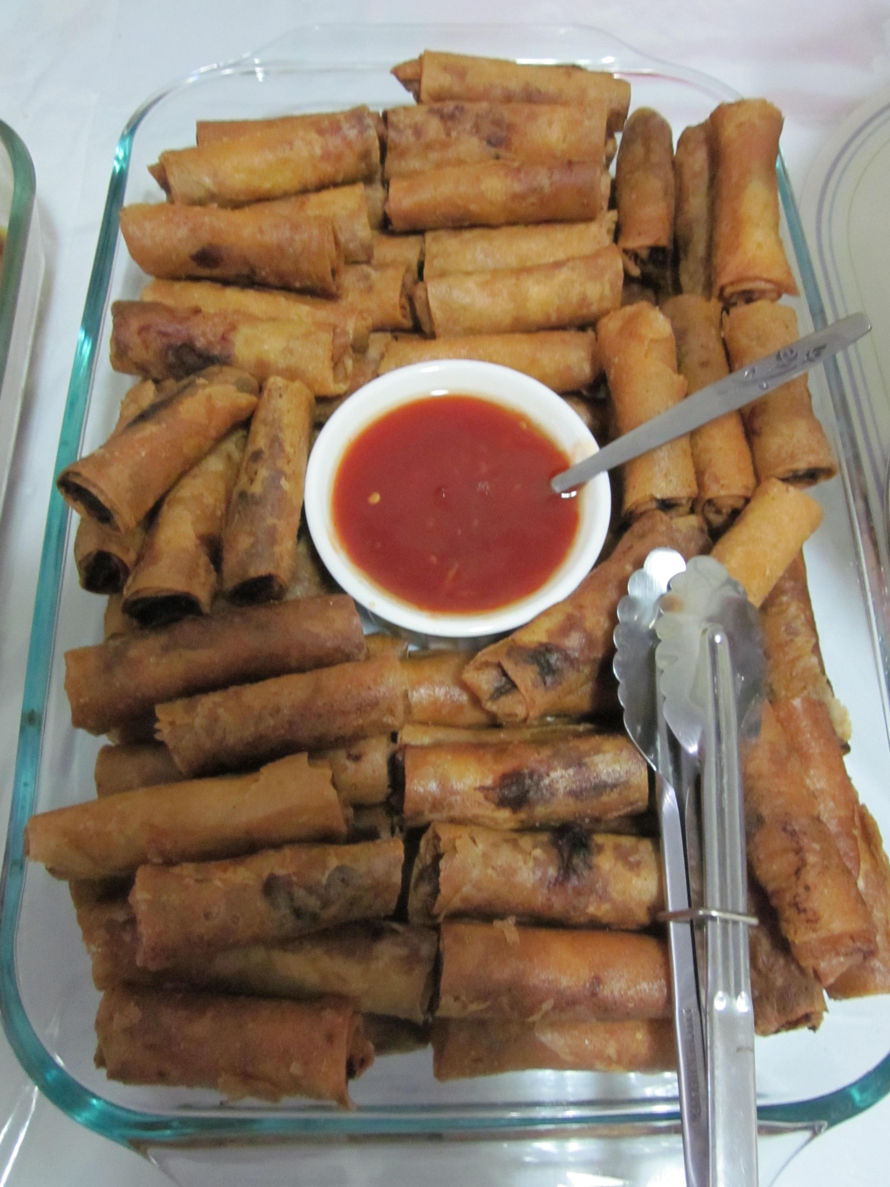 A tray of Lumpiang Shanghai